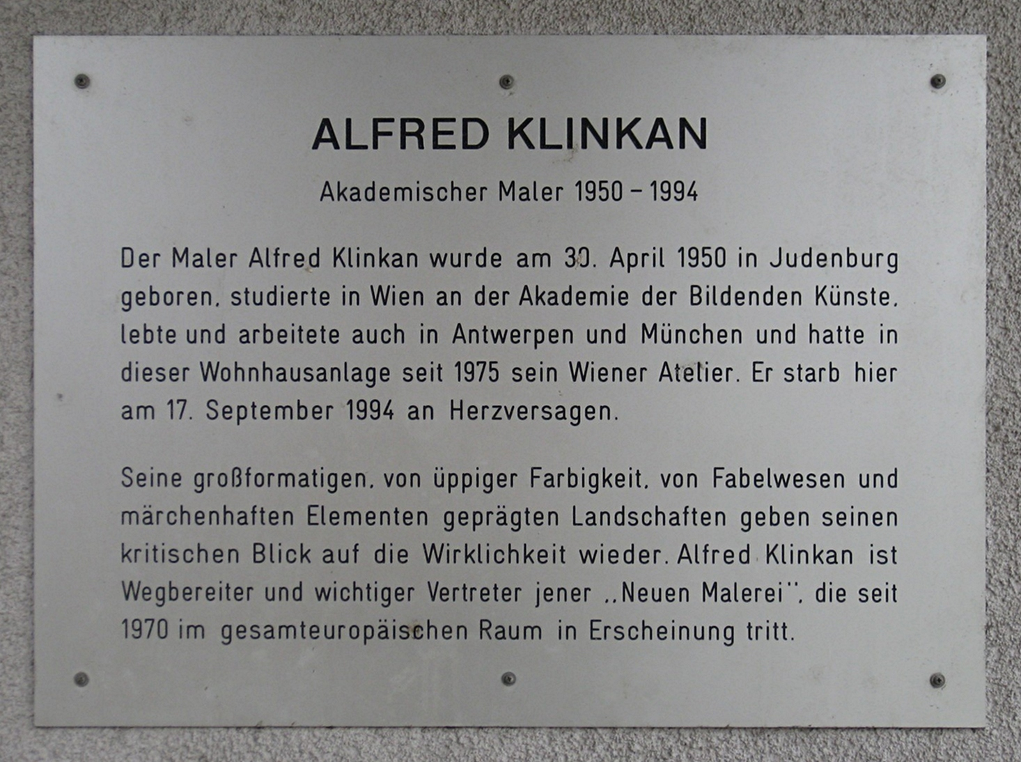 Alfred Klinkan-Gedenktafel im Alfred Klinkan-Hof, Arminenstraße 28a / Donaustadtstraße, Wien Donaustadt.